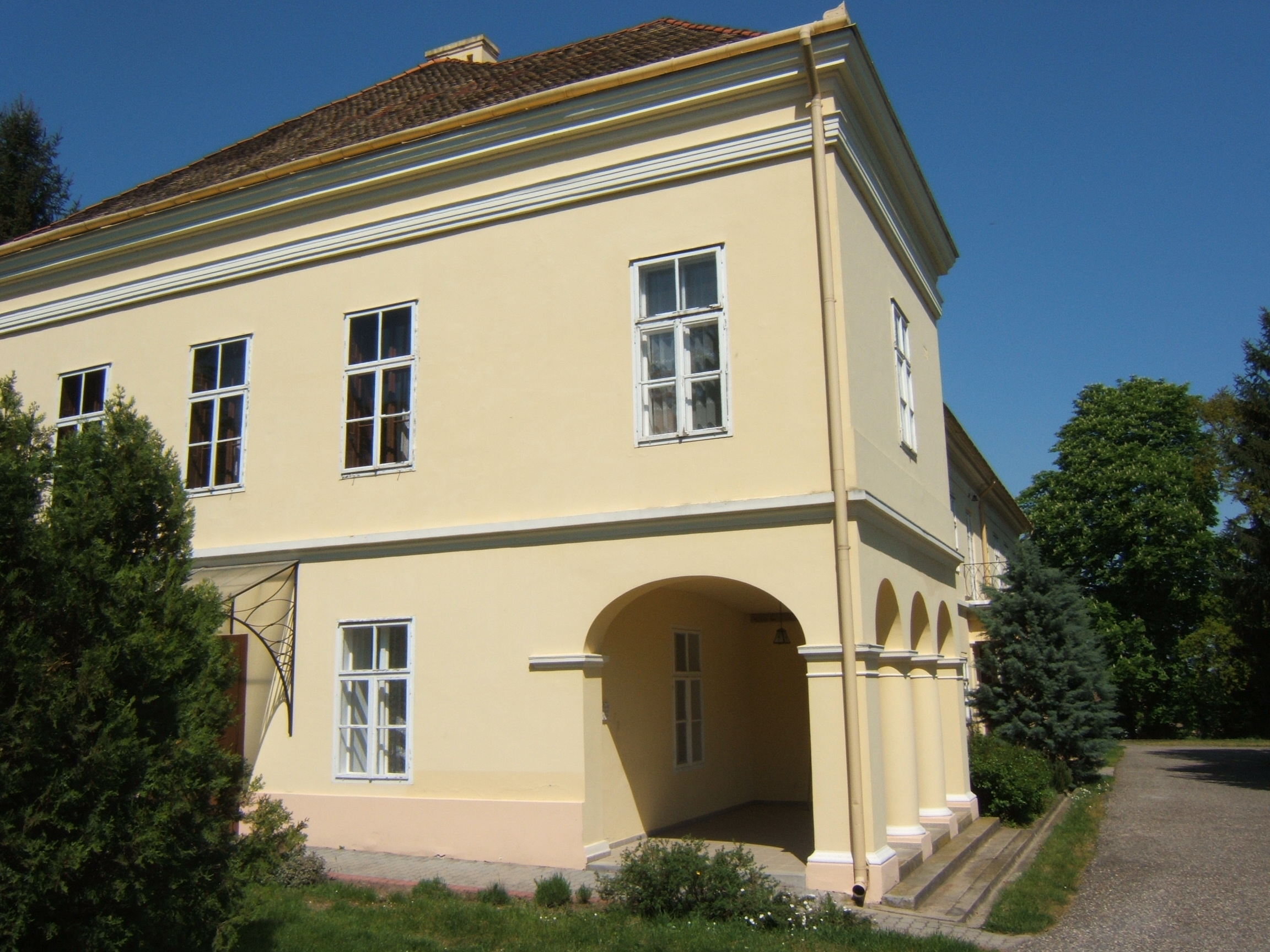 Kaposújlaki Somssich-kastély